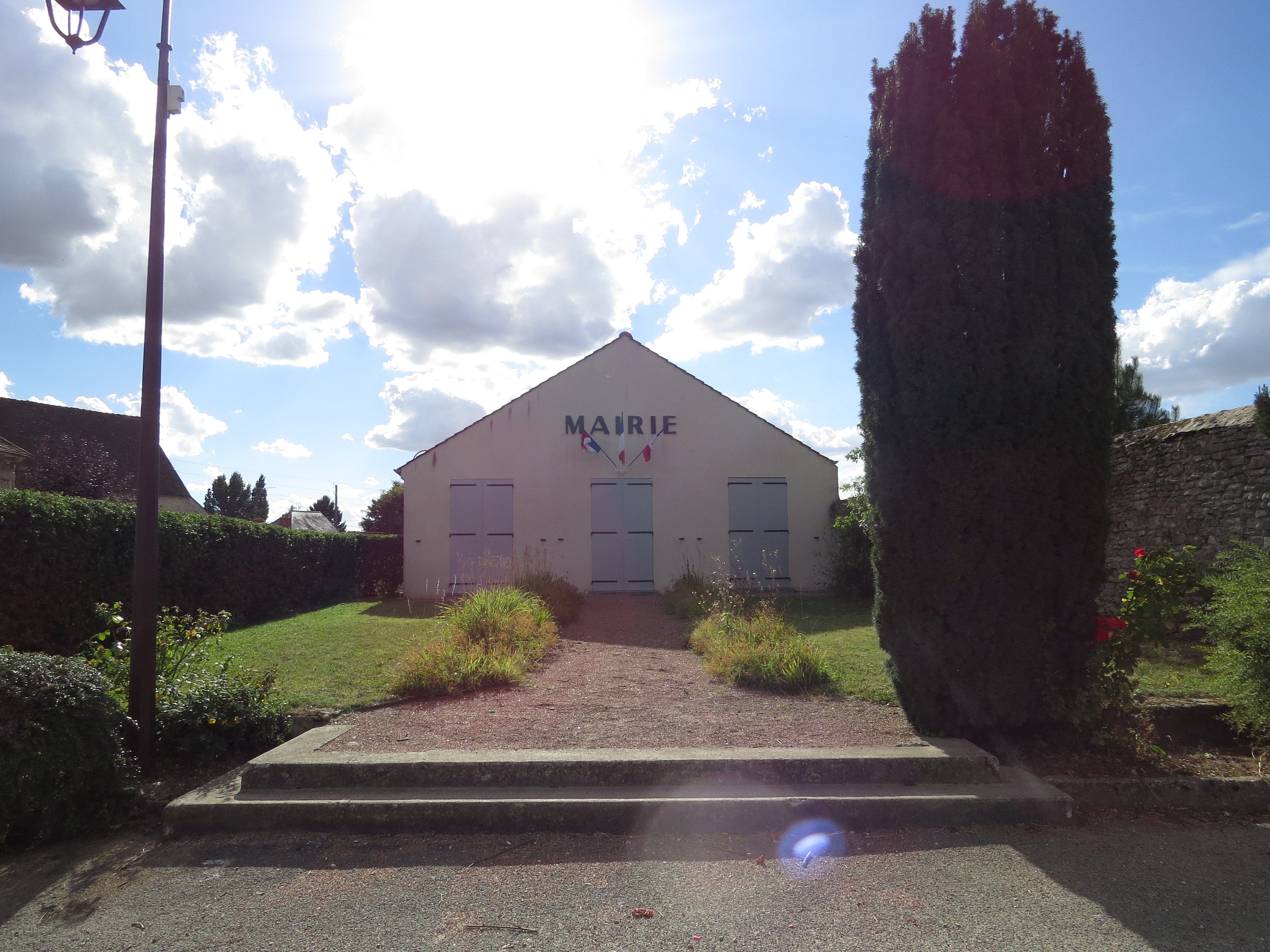 Mairie de Chatenoy (77)